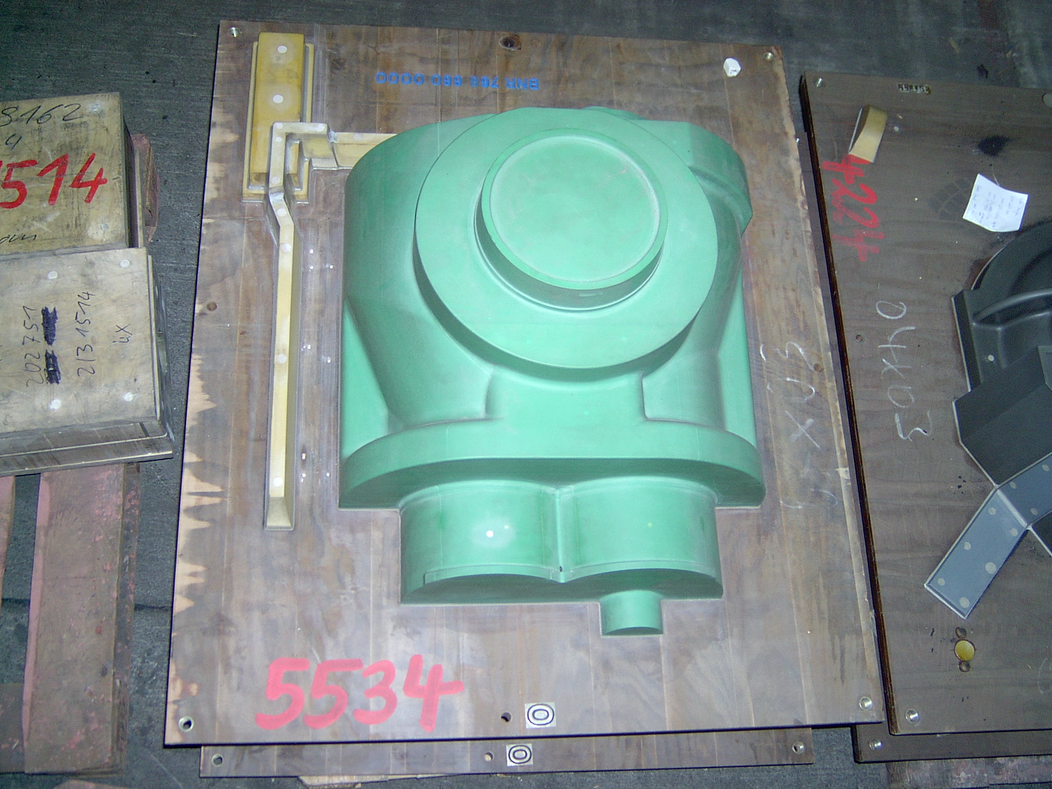 Modell für Maschinenformung/Sandguß bei Grauguß